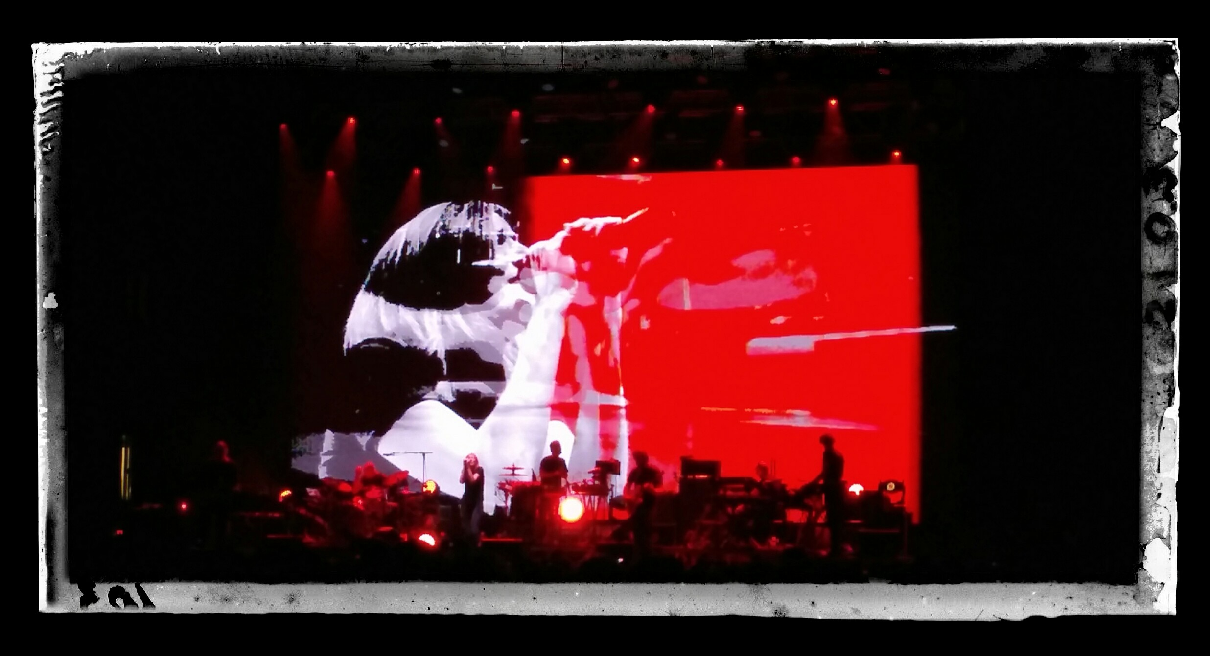 Concierto de Portishead en Madrid, julio de 2014